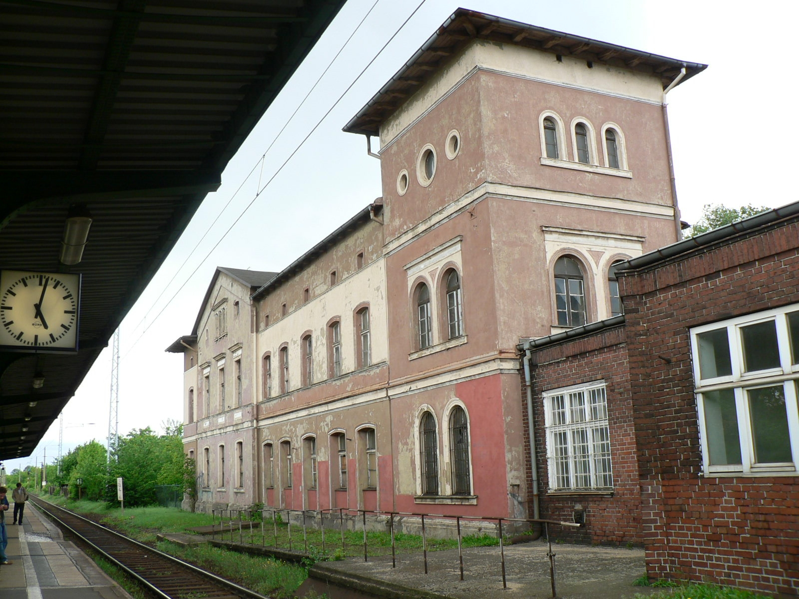 Bahnhof Eisenhüttenstadt